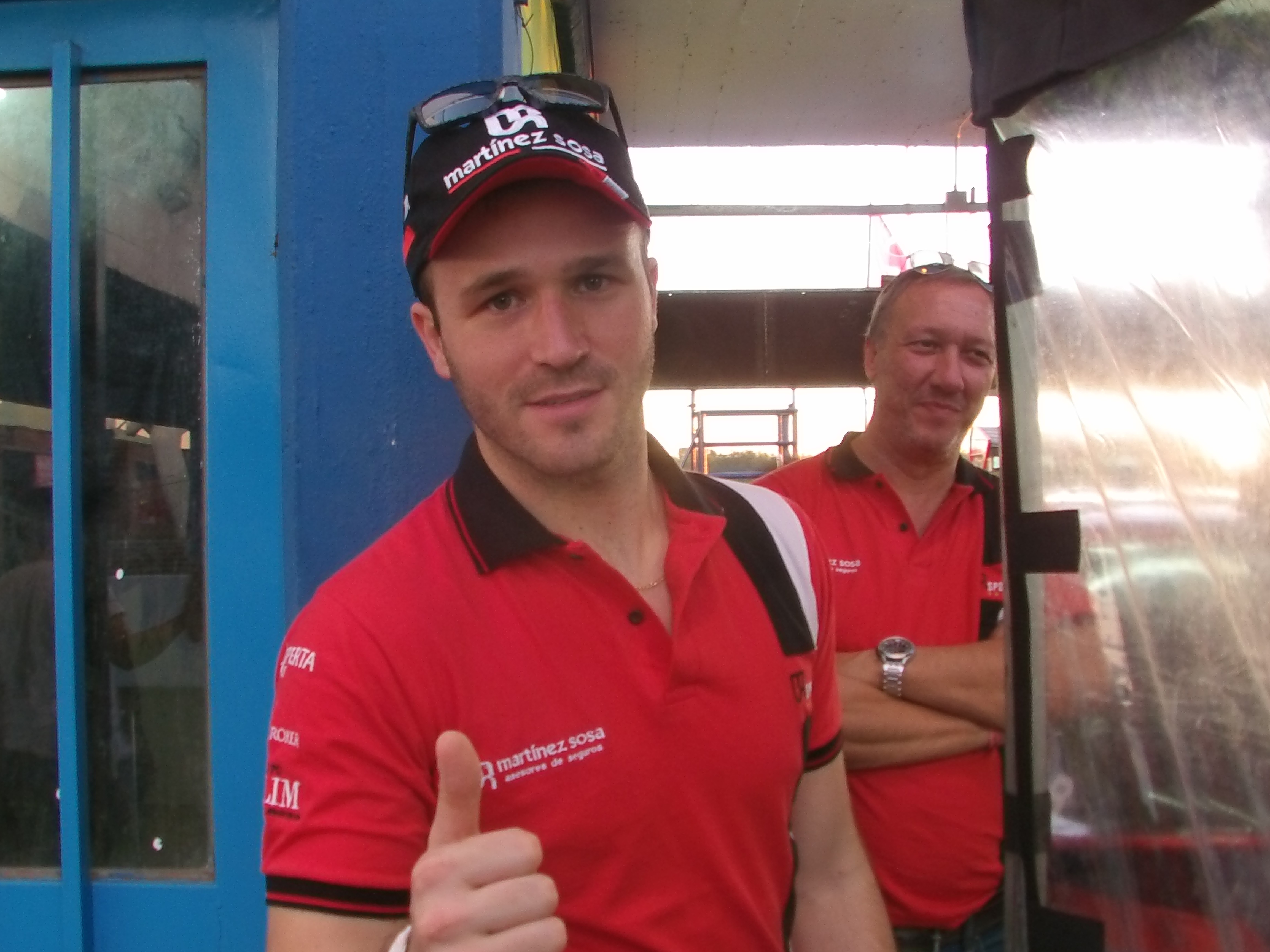 Agustín Hugo Canapino, piloto argentino de automovilismo de velocidad. Campeón 2010 de Turismo Carretera. Campeón 2008 de TC Pista. Séxtuple campeón de Top Race V6. Campeón 2007 de Copa Mégane.